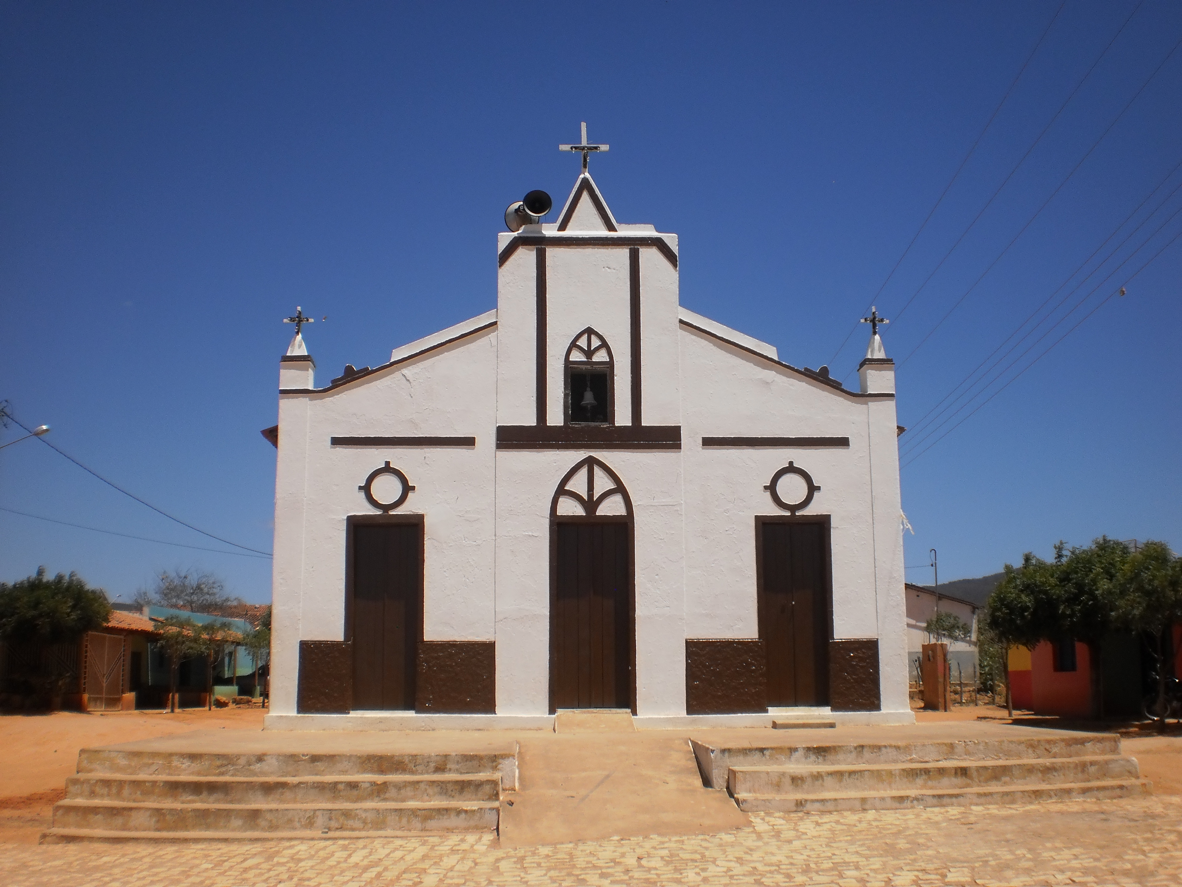 Capela Santo Antônio, Sítio Pitombeira - Luís Gomes, Rio Grande do Norte, Brasil.